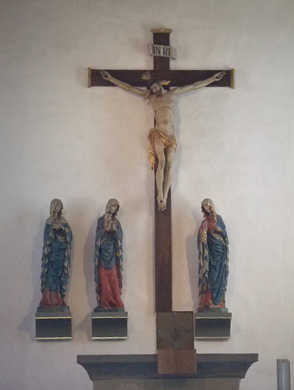 Trochtelfingen, Landkreis Reutlingen Pfarrkirche St. Martin, Kreuzigungsgruppe